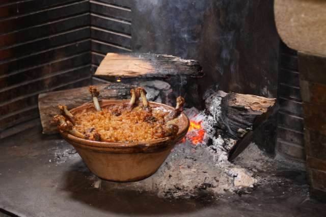 Le Cassoulet de Castelnaudary